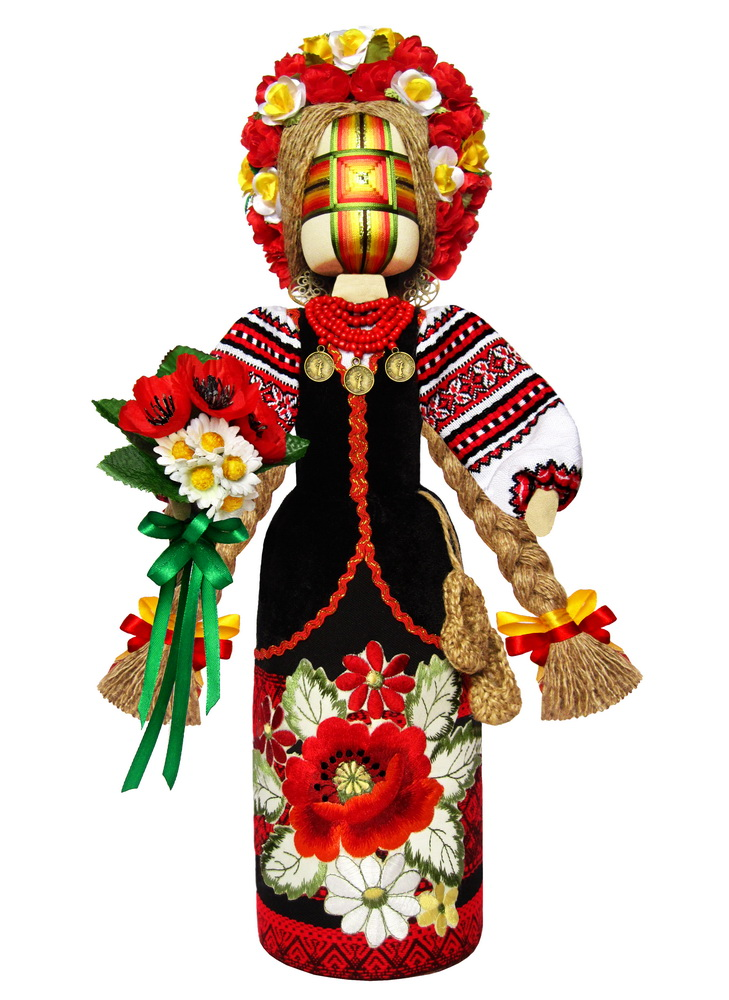 Авторська лялька - мотанка Чаруня Тетяни Білокрилець